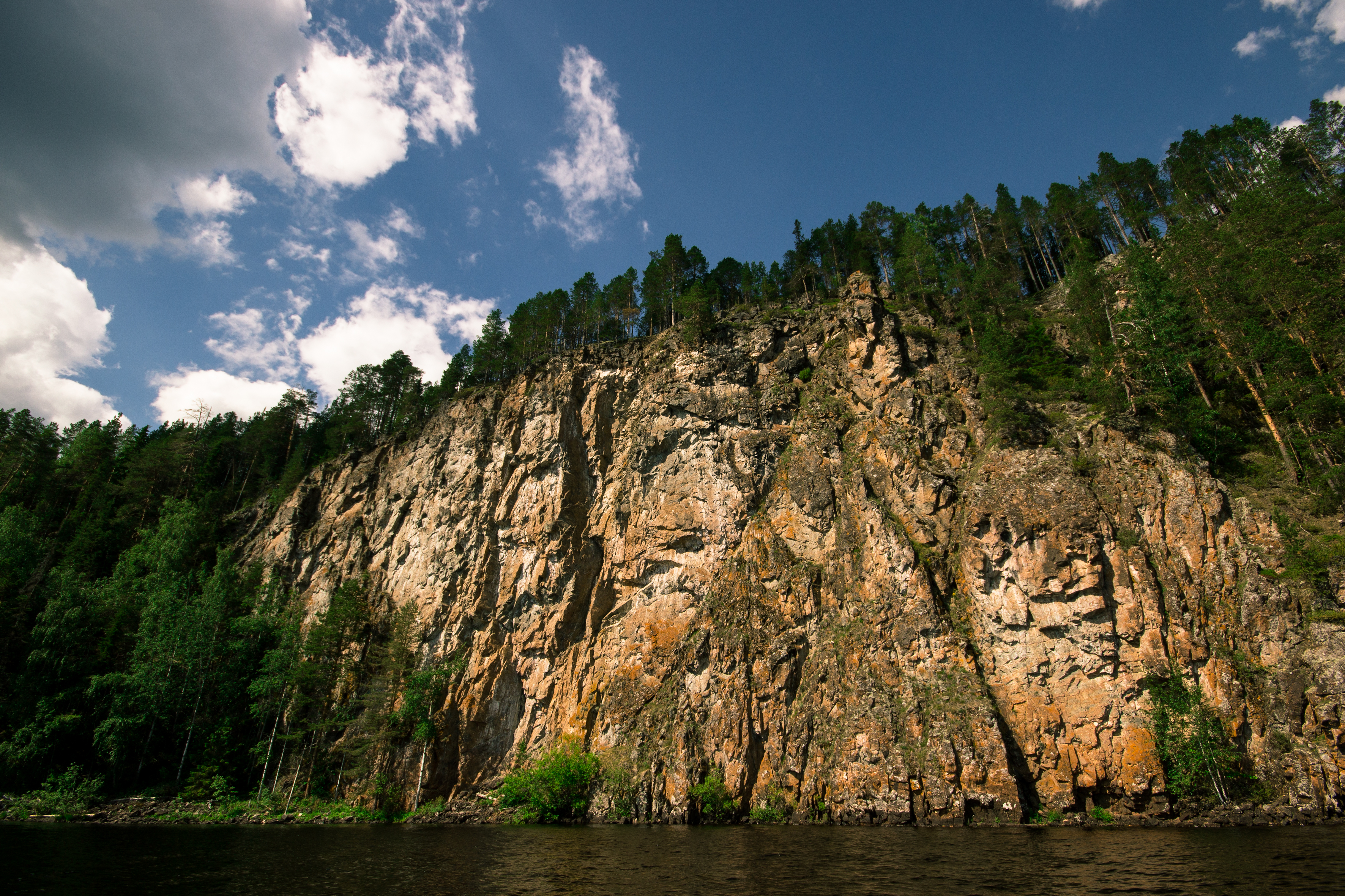 Паанаярви: Западная граница национального парка совпадает с государственной границей России с Финляндией. Со стороны финской границы к “Паанаярви” примыкает национальный парк “Оуланка”,Лоухский район, This image is related to the protected area of Russia number 1000069